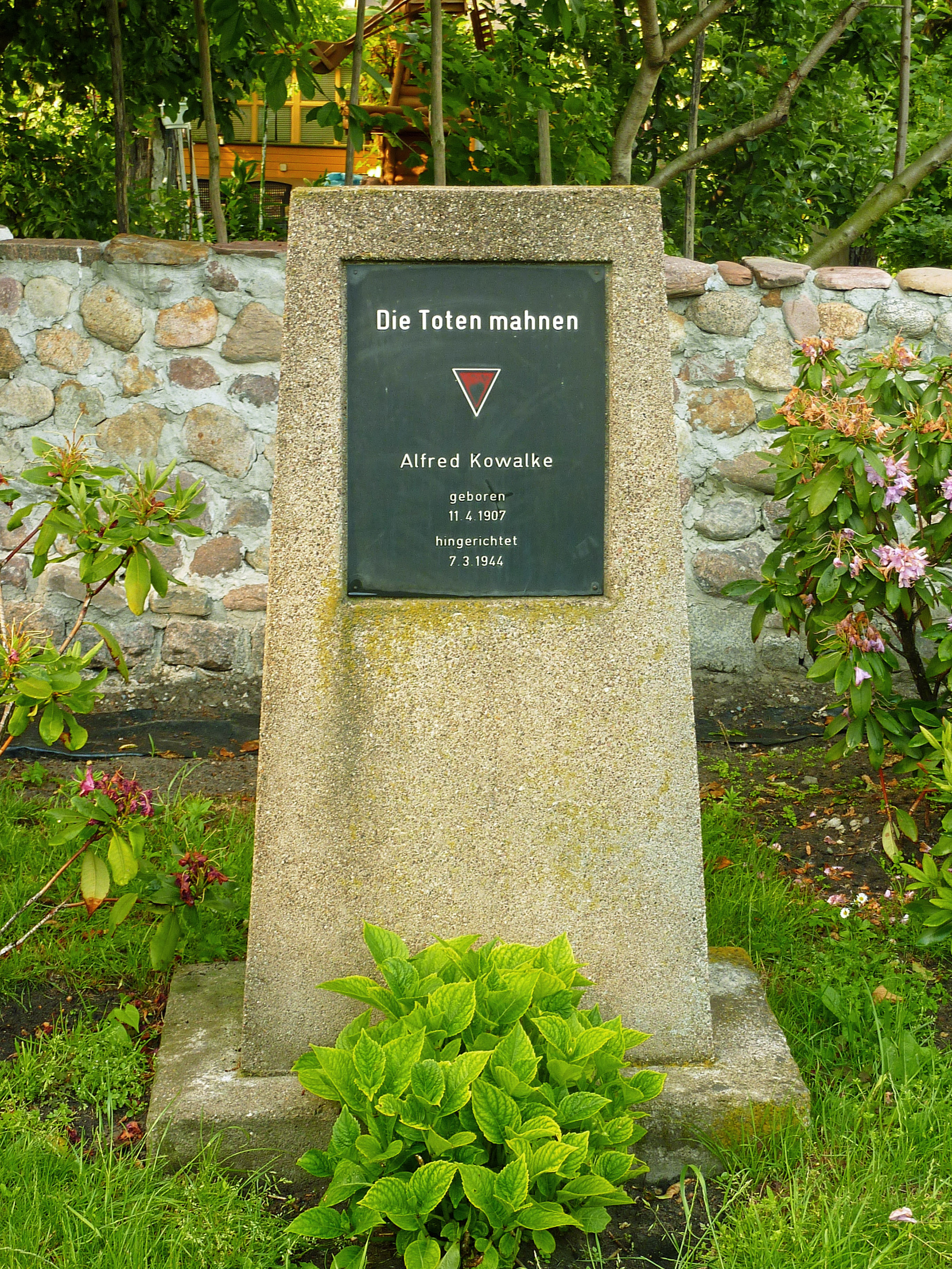 Gedenkstein für Alfred Kowalke († 6.3.1944) im Zentrum der nach ihm benannten Kleingartenanlage auf der Halbinsel Stralau in Berlin-Friedrichshain. Das Todesdatum auf der Tafel ist falsch. [1]